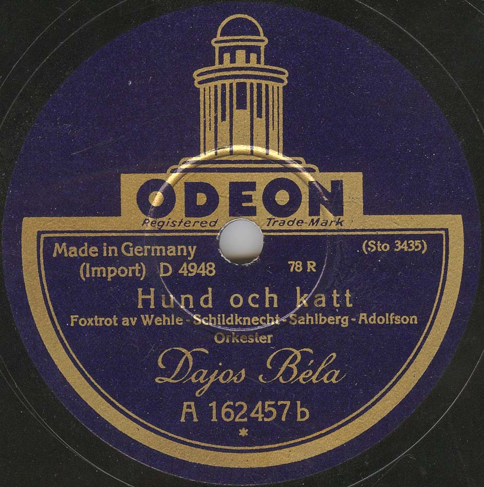 Skivetikett från Odeon med inspelning av Dajos Bélas orkester 1929.